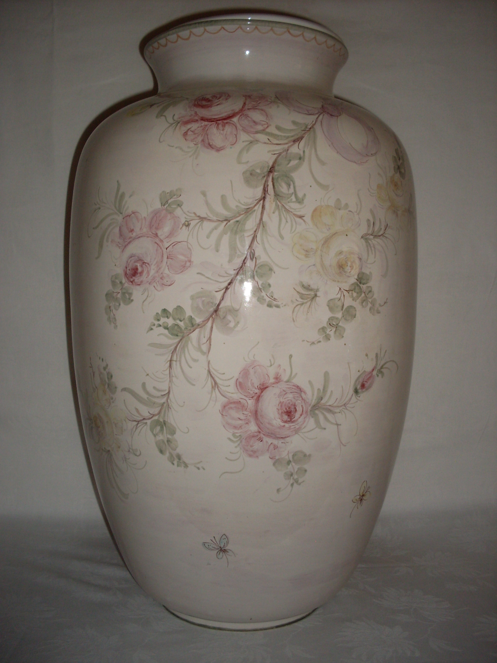 Bodenvase (mit Einsatz) handbemalt, Dekor "Rosen", Art.Nr.: 56/2, H 64cm, 2. MZ, von Ulmer Keramik